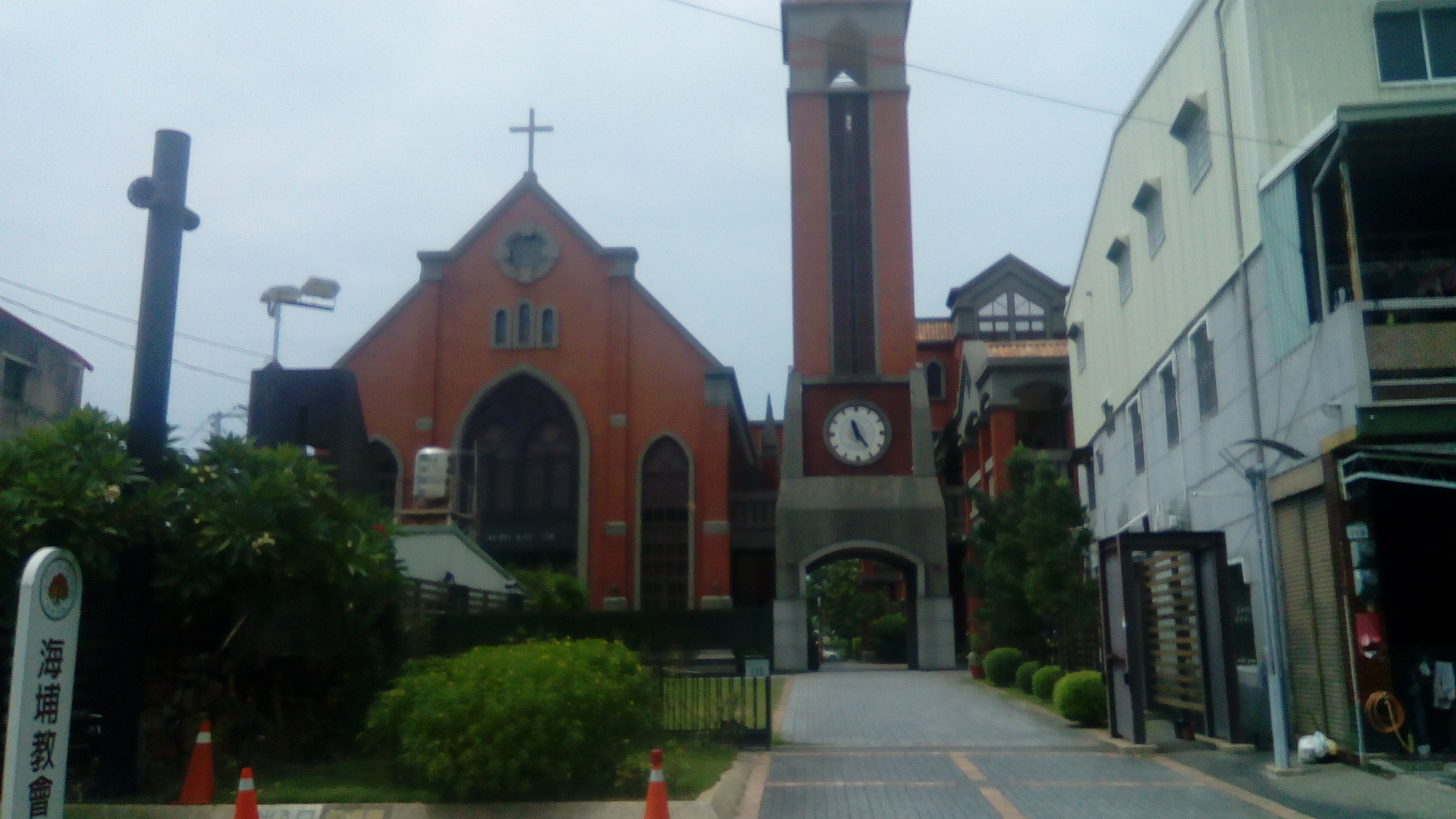 台灣基督長老教會海埔教會，位於台17甲線，地址：高雄市湖內區和平路115號。